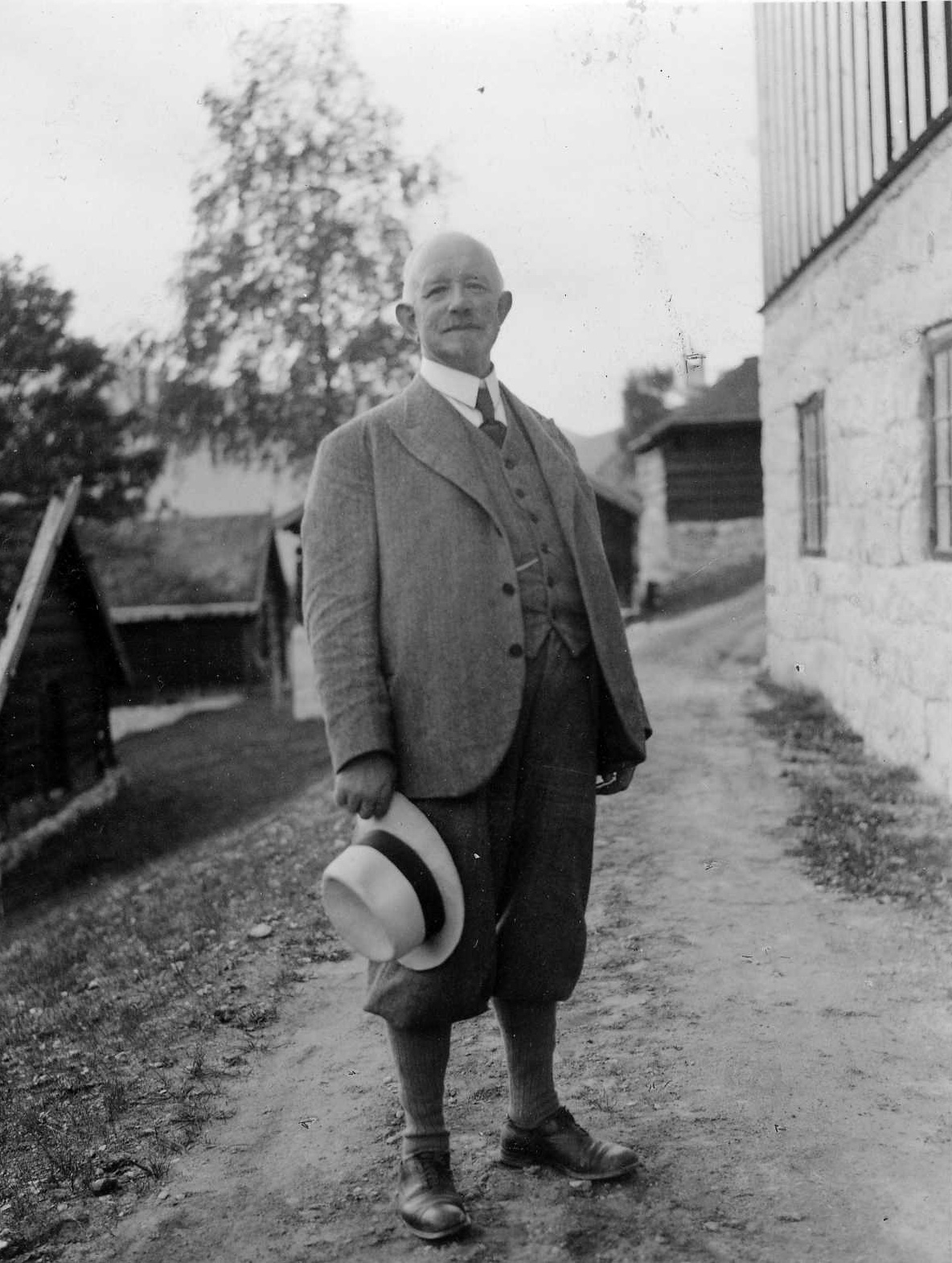 Heiberg ii friluftsmuseet